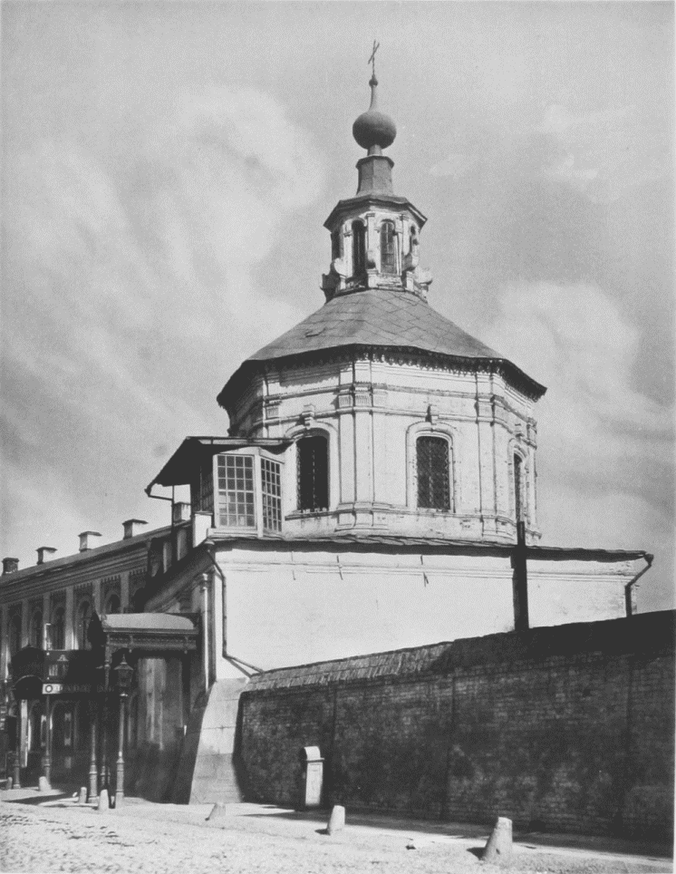 Святые ворота Златоустовского монастыря в Москве.